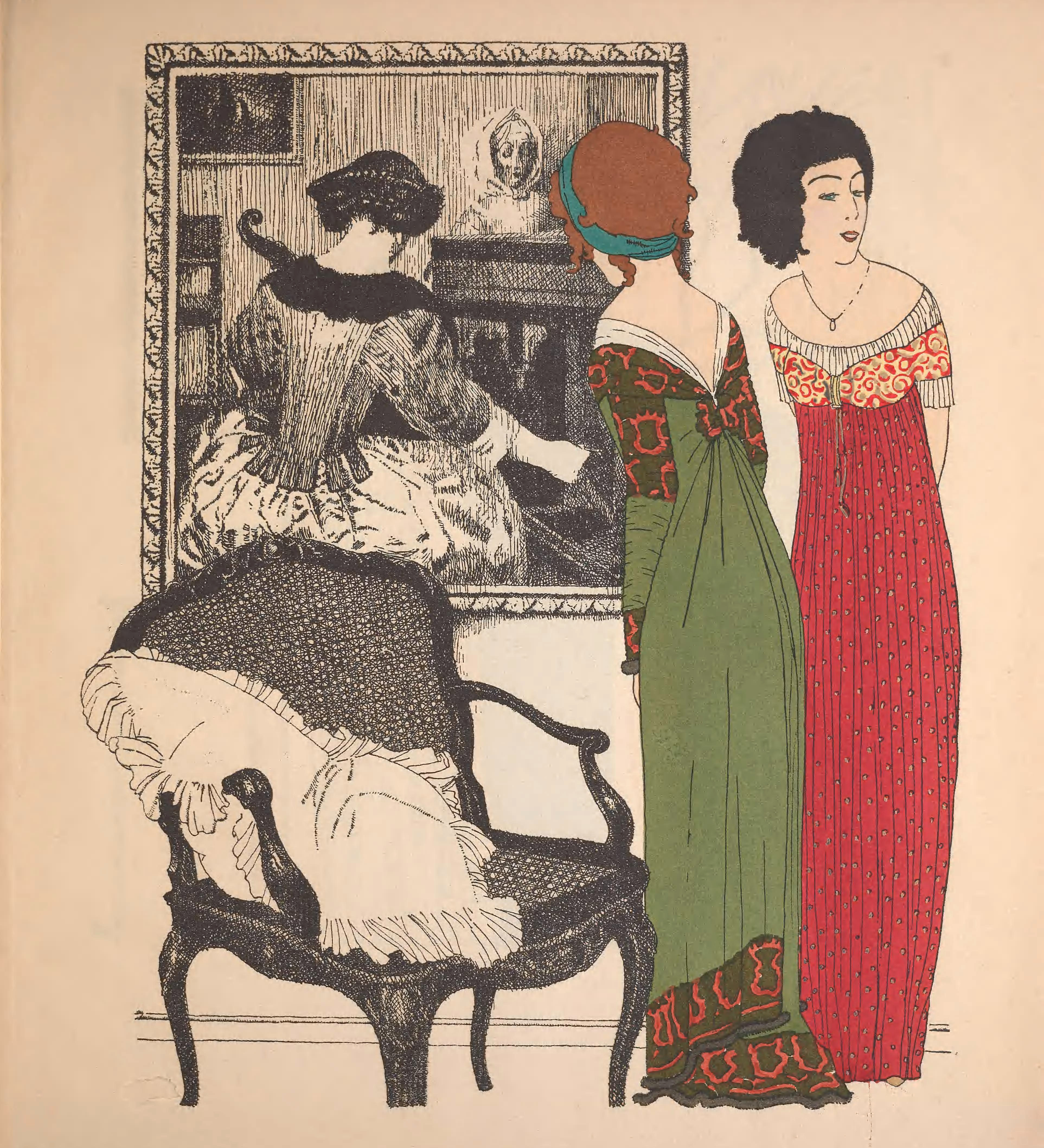 Fashion illustration for Les Robes de Paul Poiret, p. 15